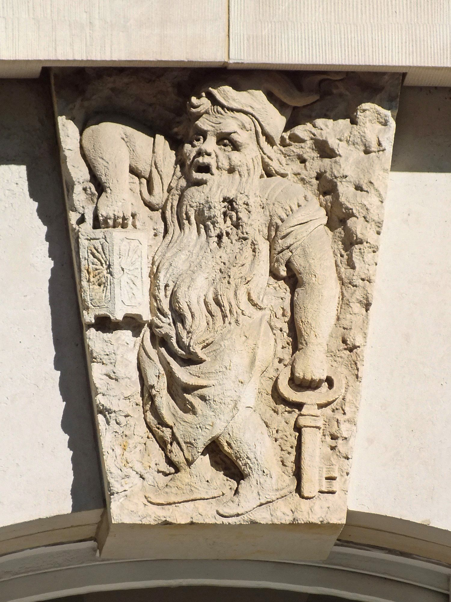 Detail am Märchenhaus in Leipzig, Philipp-Rosenthal-Straße 21